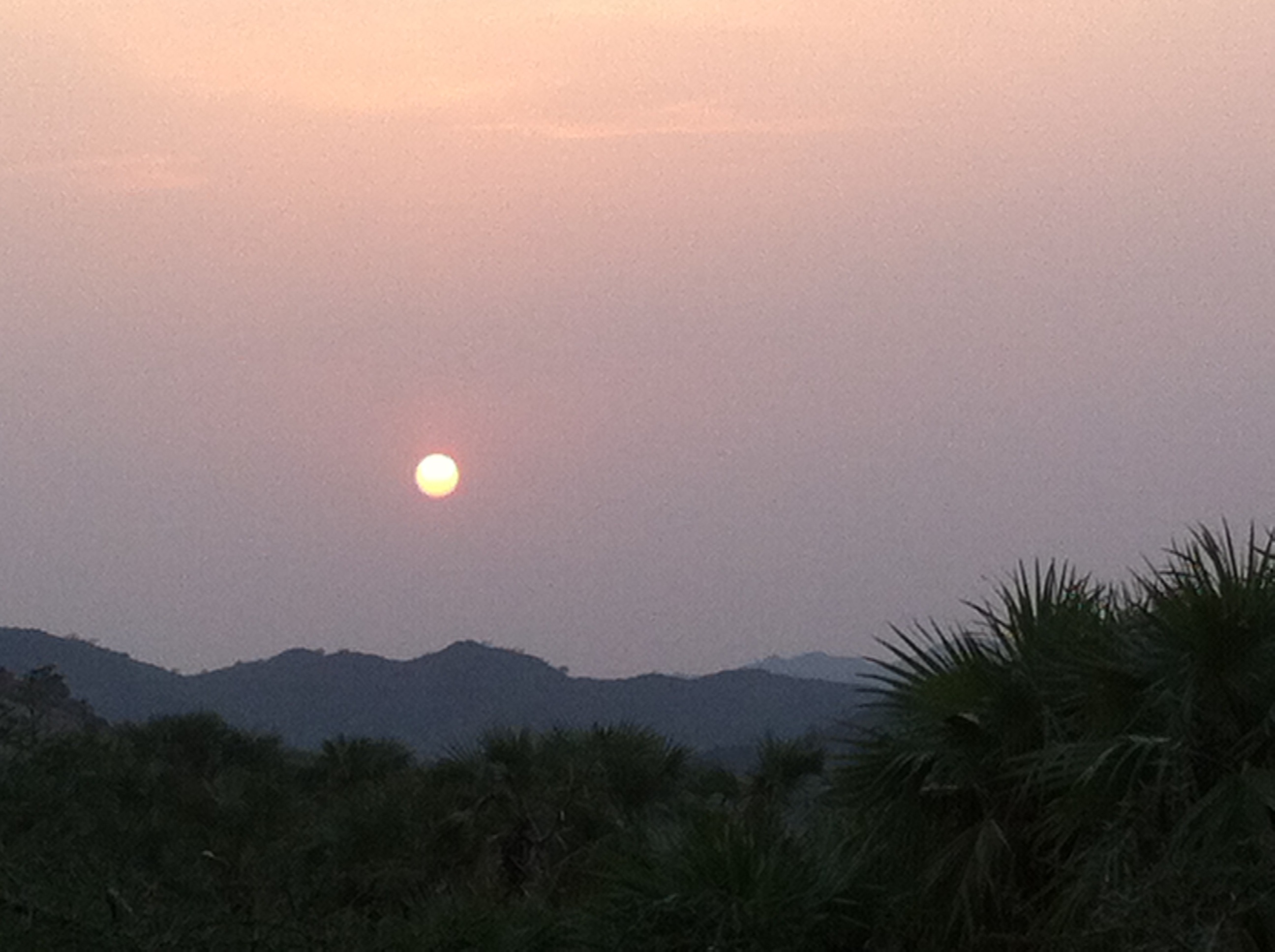 غروب الشمس في وادي الغمار